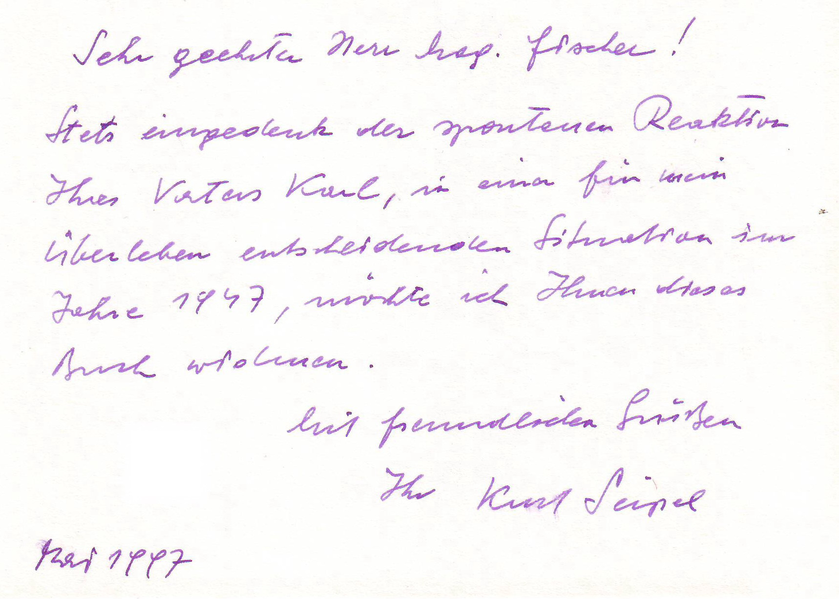 Kurt Seipel, Widmung Mai 1997; in Privatbesitz des Autors. Alle Rechte liegen bei Dnalor_01.